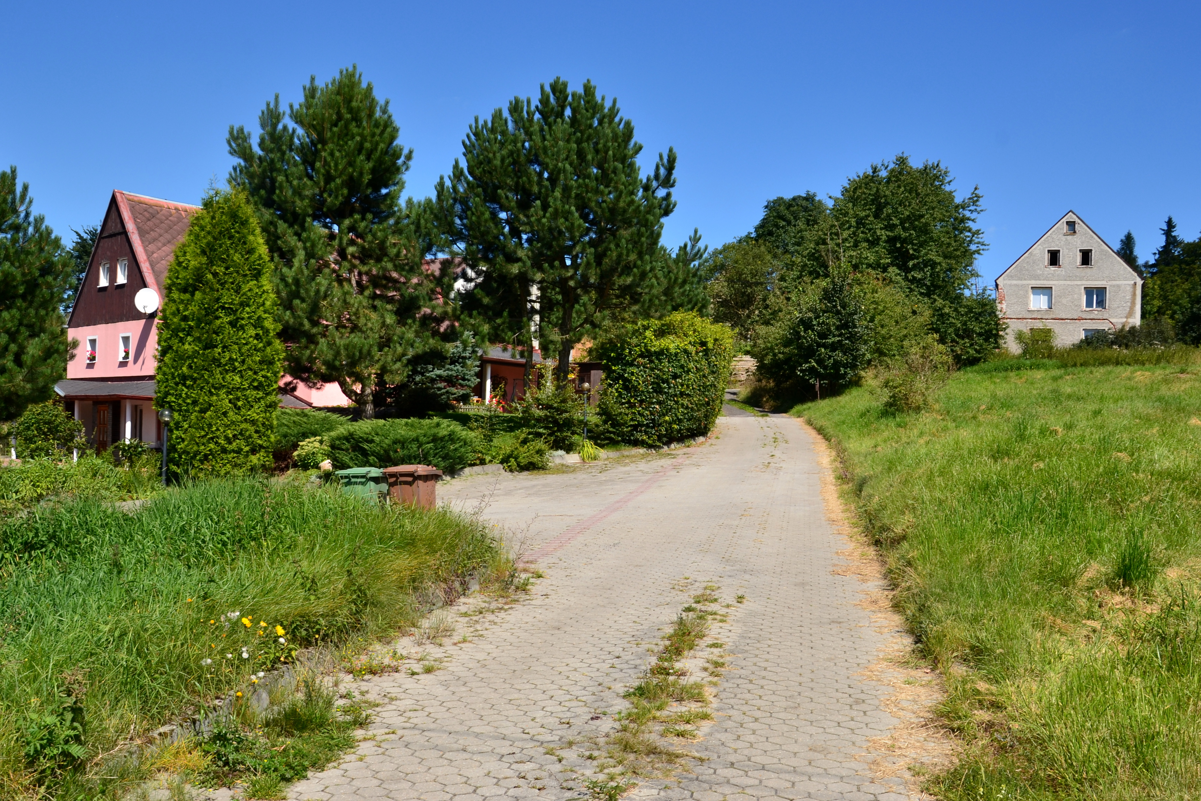 Západní vjezd do osady